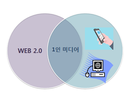 1인 미디어의 등장 배경(web 2.0과 스마트폰의 공급)